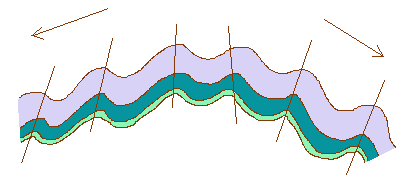 Schema eines geologischen Antiklinoriums